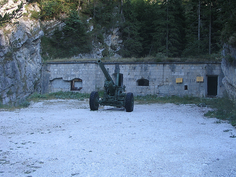 Stražnica pri Rabeljskem jezeru